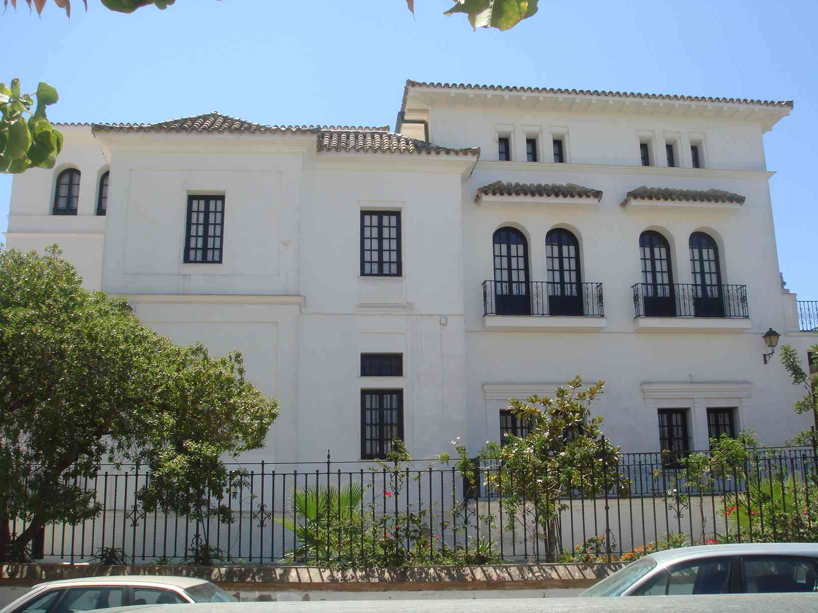 Fachada lateral, a la avenida del Cerro Falón, del hotel de los Marqueses de Villamarta; construido en 1907 por Aníbal González, por encargo del marqués Álvaro Dávila y Agreda. Posteriormente se convertirá en el Colegio María Luisa Terry, actualmente integrado en el Instituto de Enseñanza Secundaria San Lucas. Sanlúcar de Barrameda (Cádiz, España).